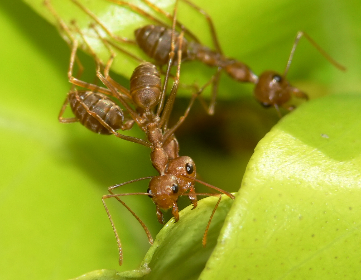 Afrikanische Weberameisen (Oecophylla longinoda) am Nest in Kamerun, Banyang Mbo Research Station